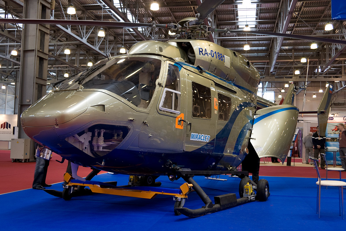 MBB/Kawasaki BK 117C-1